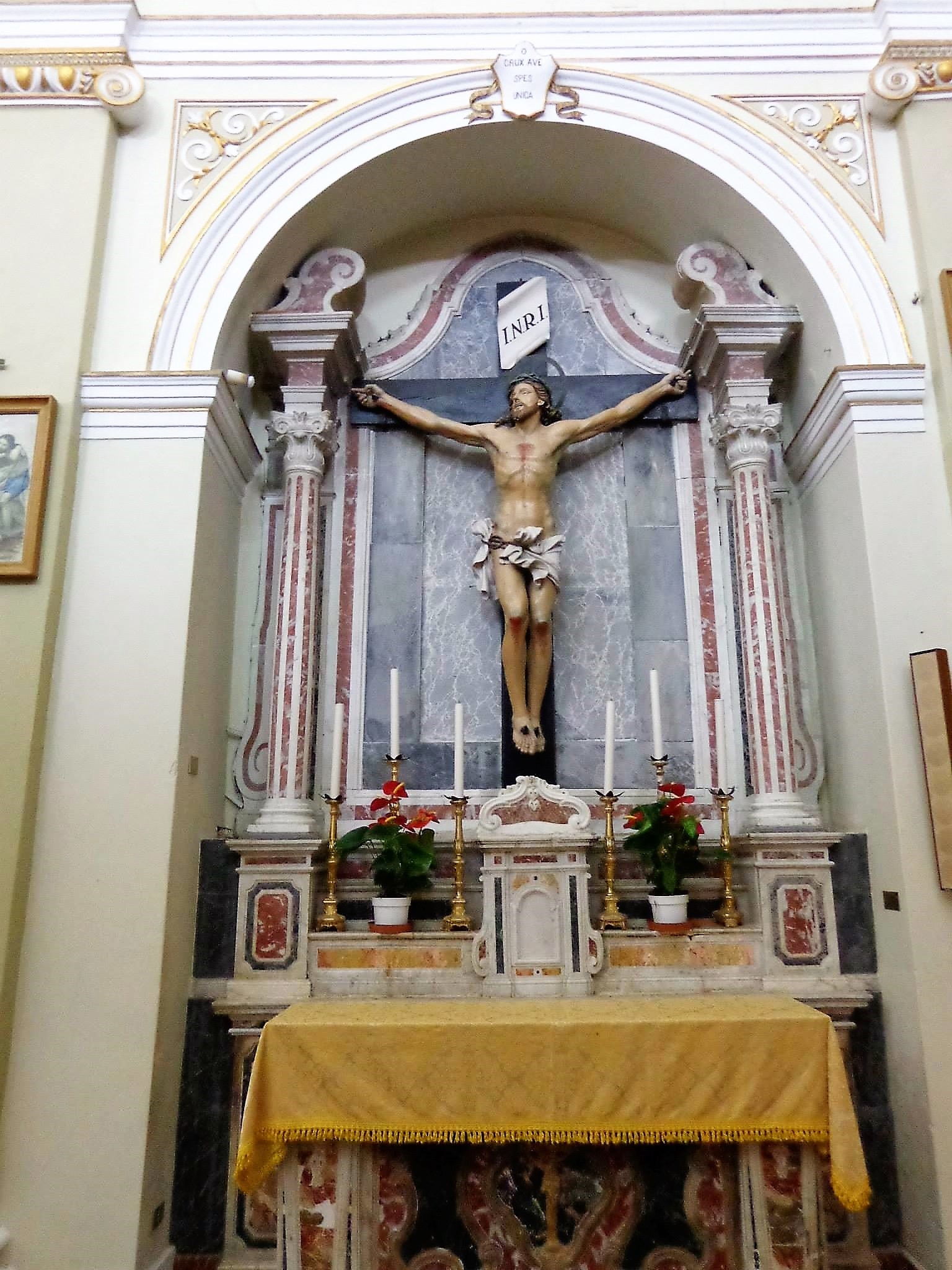 Altare del Crocifisso, chiesa di San Giuseppe